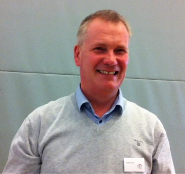 Per Husted borgermesterkandidat i Mariagerfjord Kommune. Han har siden 1. januar 2010 været medlem af Folketinget for Socialdemokraterne.